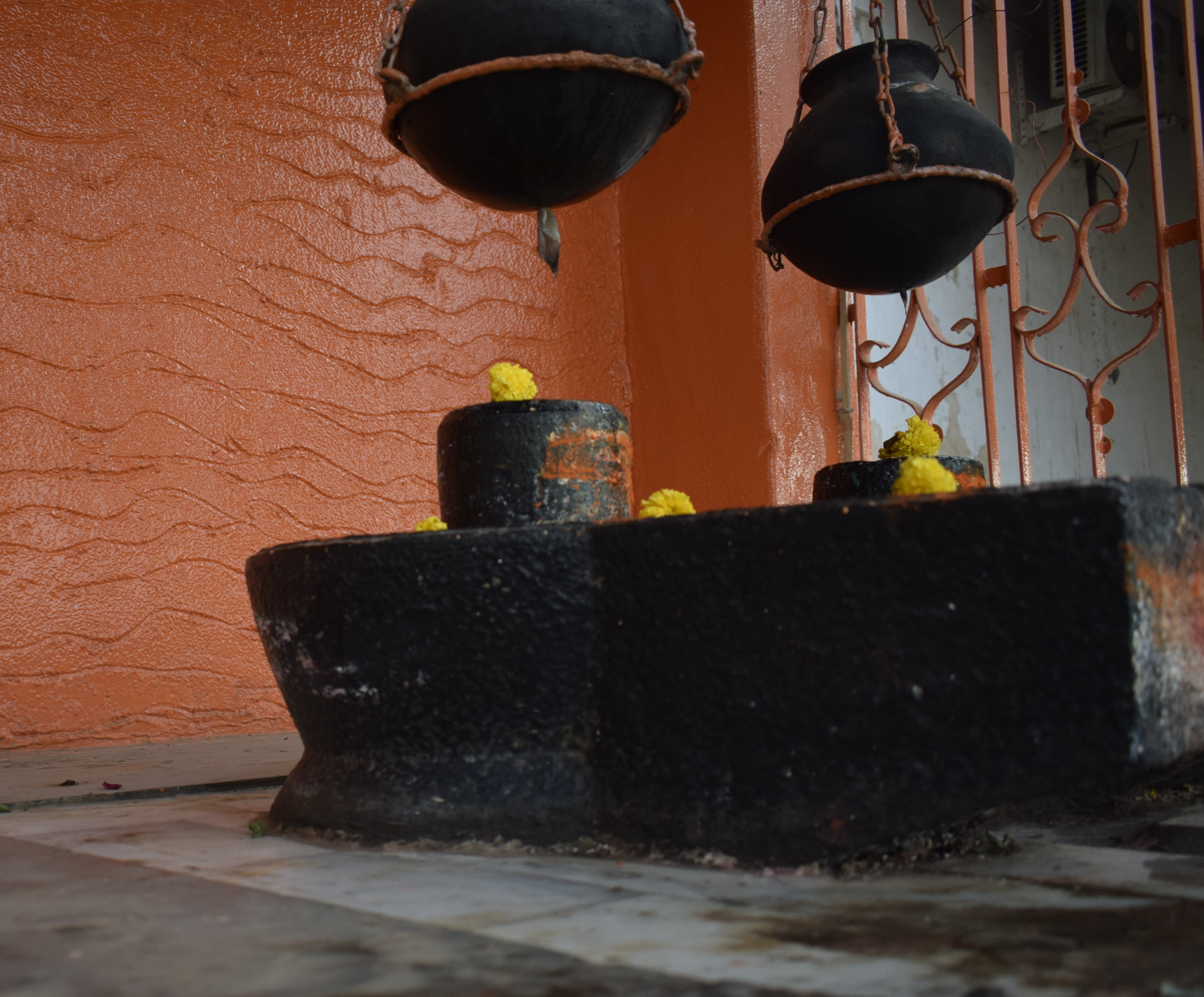 श्री अकलेश्वर लिंग